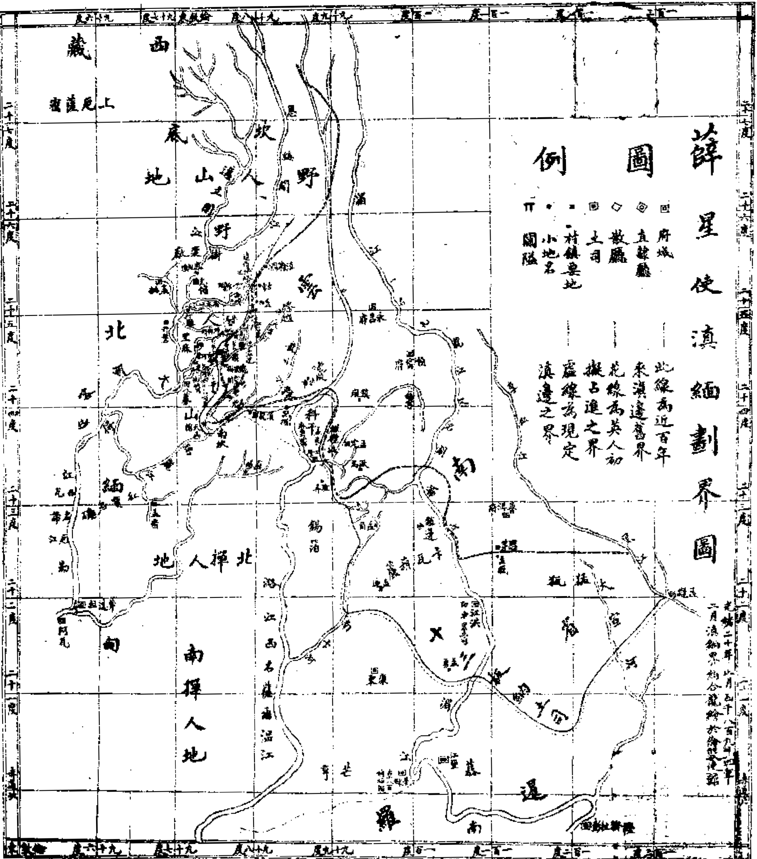 中文（中国大陆）: 薛福成1902年《滇缅划界图说》中的滇缅划界图